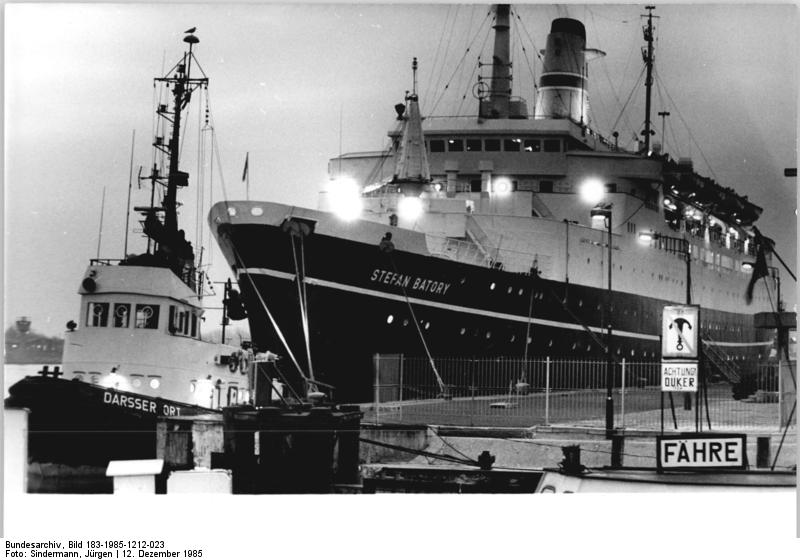 Rostock, Überseehafen, Passagierschiff, Schlepper ADN-ZB Sindermann 12.12.85-Ge. - Rostock: Mit dem Passagierschiff "Stefan Batory" trafen zu einem zweitägigen Aufenthalt im DDR-Küstenbezirk rund 700 Mitglieder des polnischen Jugendverbandes ZSMP in Warnemünde ein. Die Gäste befinden sich auf einer Friedensreise über die Ostsee.